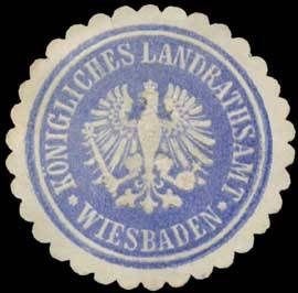 Sealing stamp Title: K. Landrathsamt Wiesbaden Description: blau, weiß, geprägt Place: Wiesbaden size: 4 cm